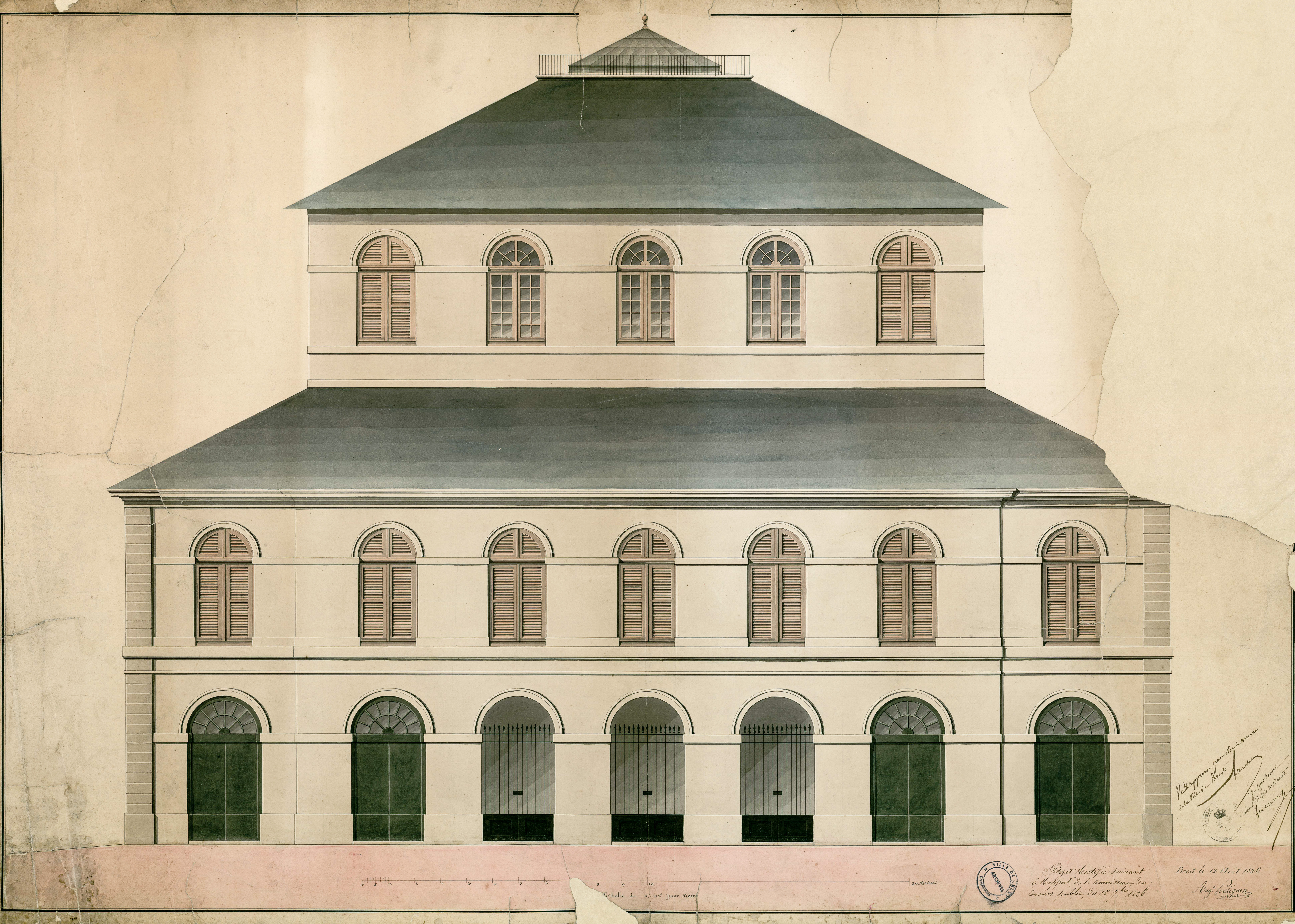 Plan de la façade de l'ancienne Halle aux blés de Brest, qui comprenait notamment une salle des fêtes, le musée des beaux-arts et une bibliothèque.